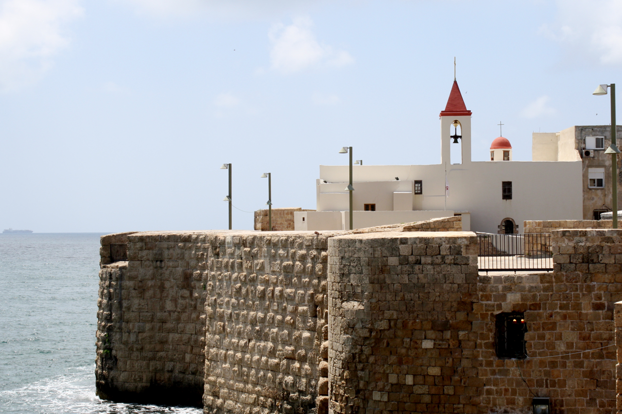 Acre